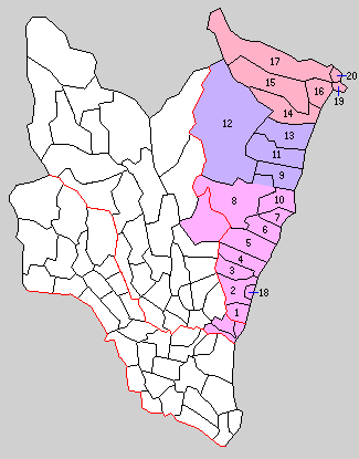 多賀郡の町村